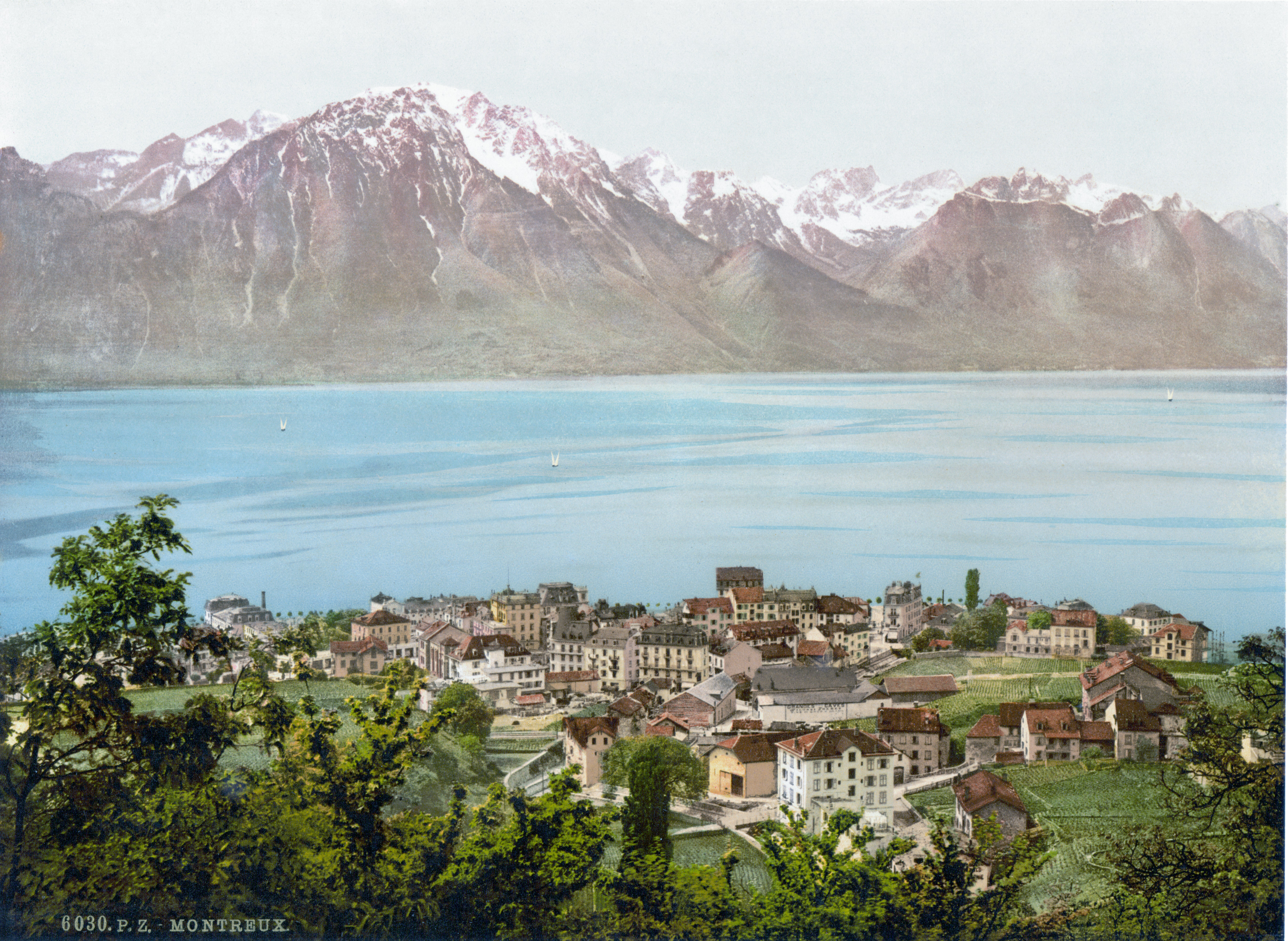 Montreux um 1900